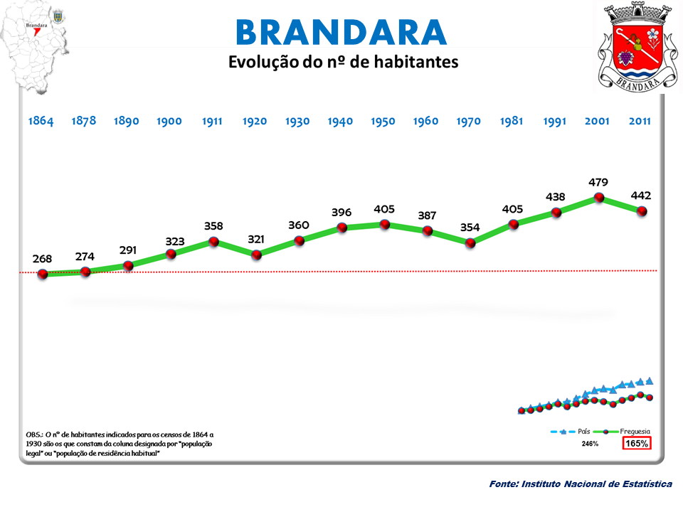 Censos 1864/2011